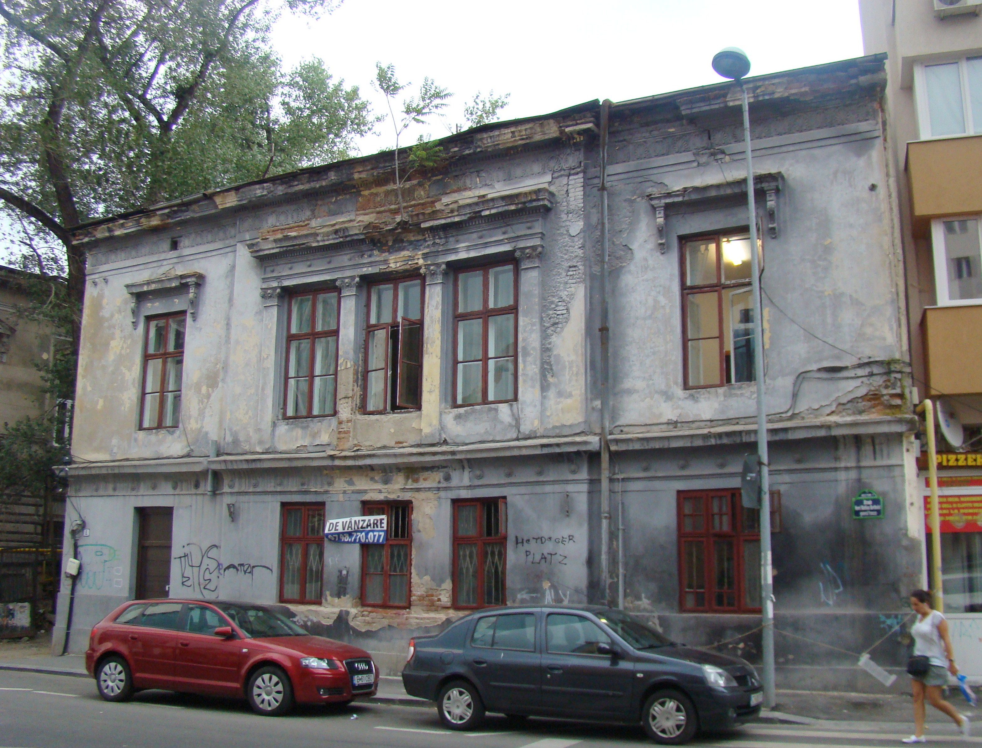 Casă monument istoric, str.Berthelot, nr.8